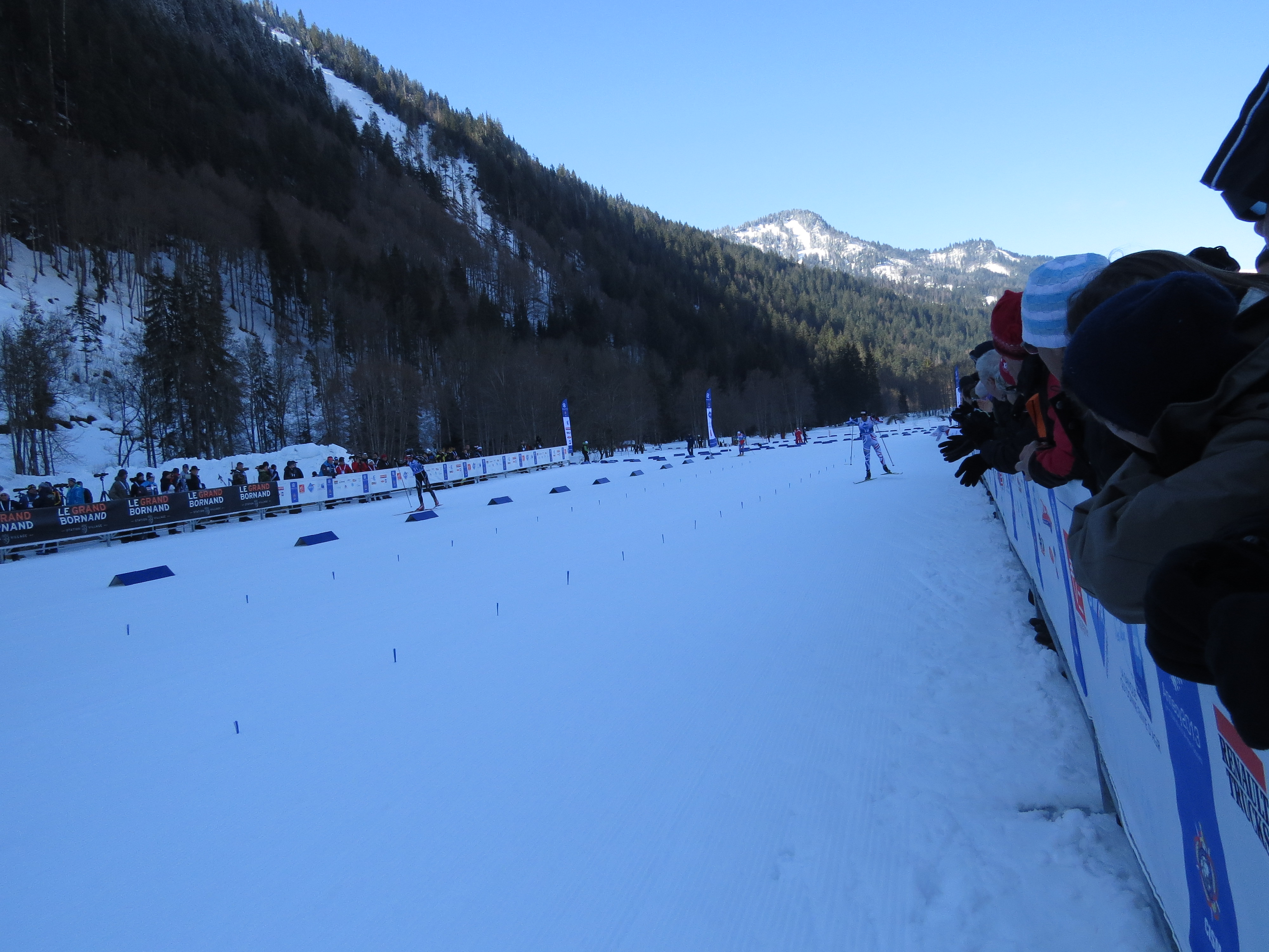 Photo réalisée sur le sprint masculin de biathlon au Grand Bornand